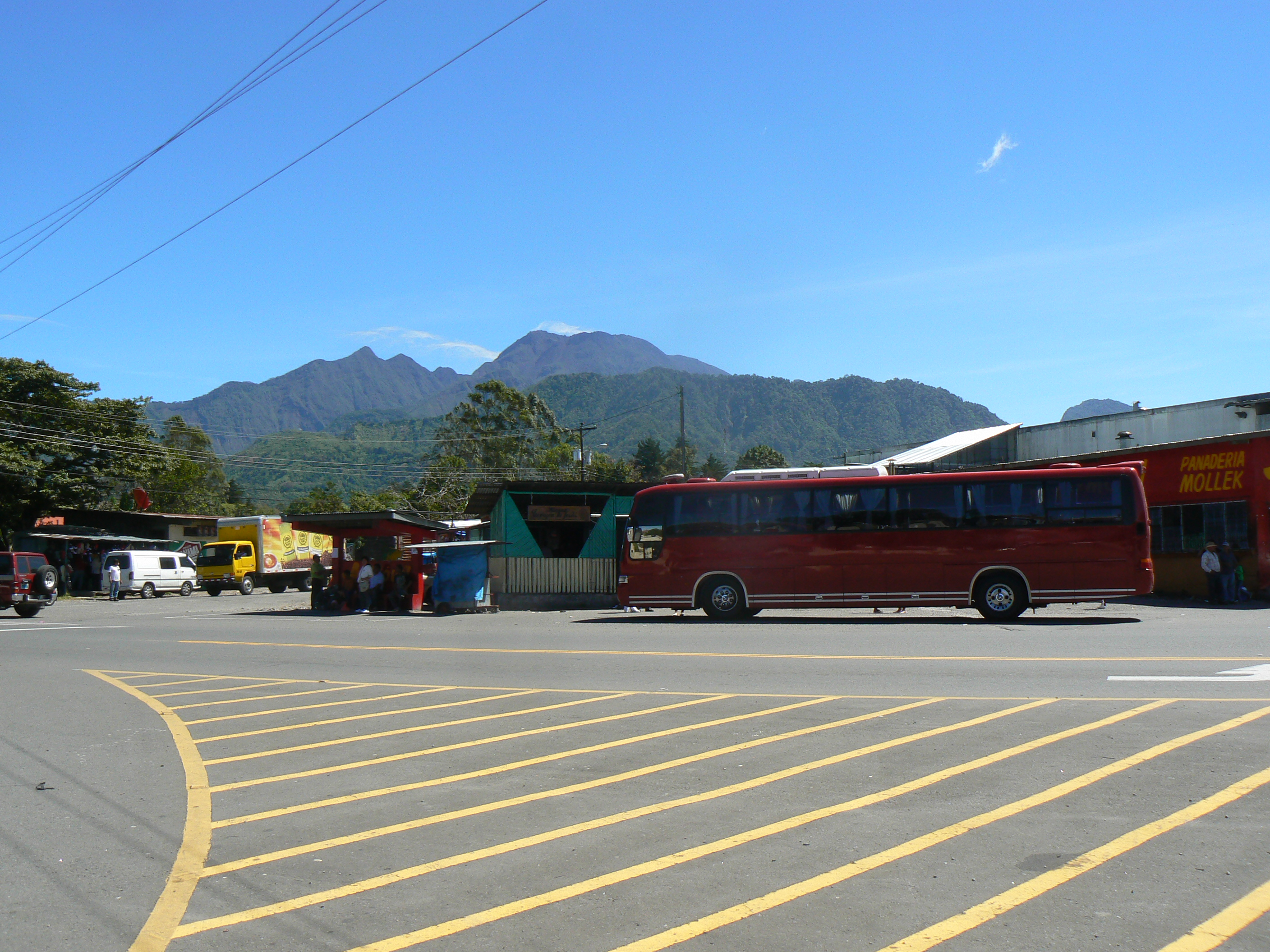 Paisajes de Calle principal de Volcán, Chiriquí